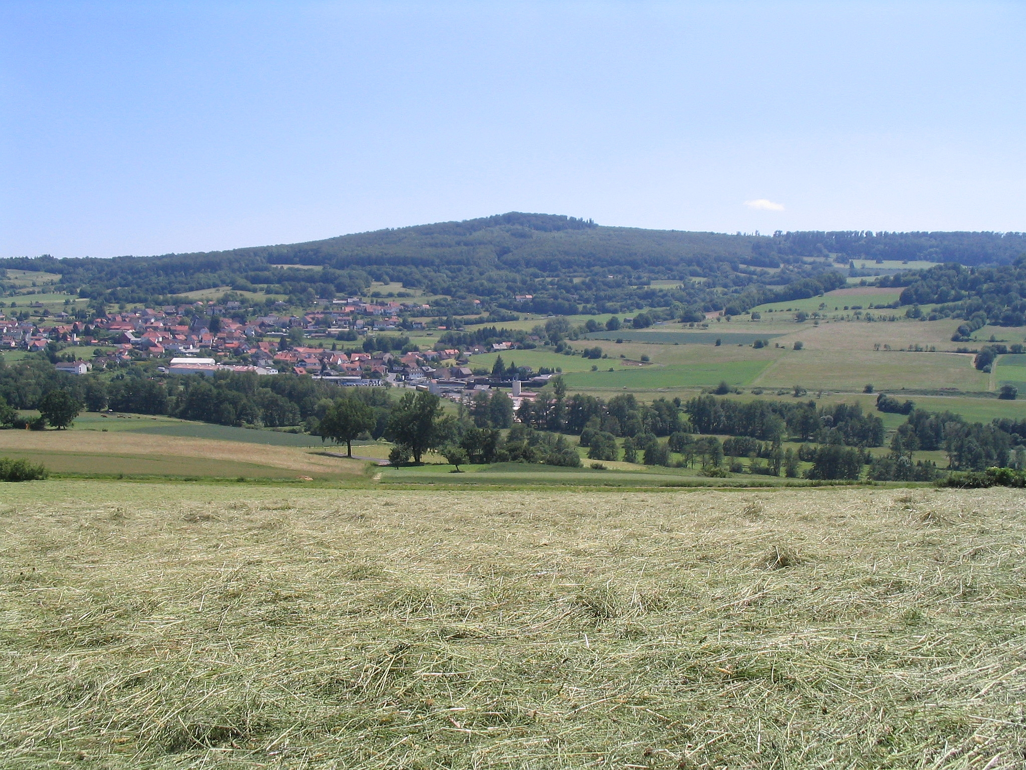 Der Haag (585 m) von Norden. Im Vordergrund Oberzell, ein Ortsteil von Sinntal.